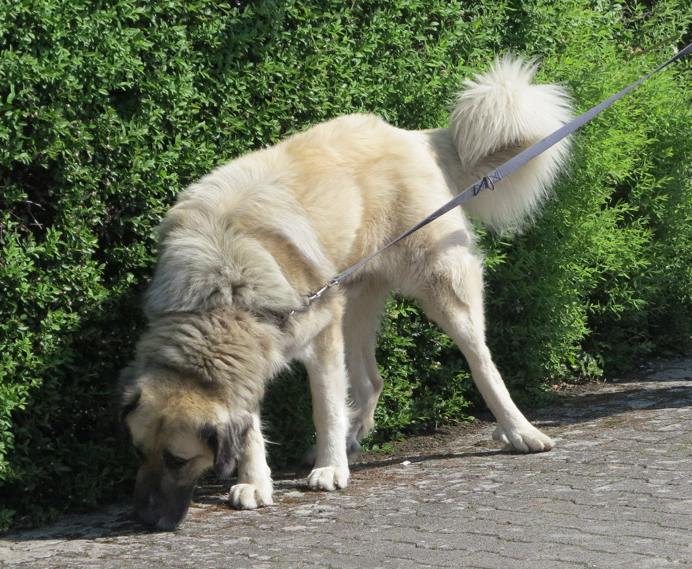 Kangal mit Afterkrallen und Fehlstellung der Hinterläufe, Hundeausstellung Worms 2018